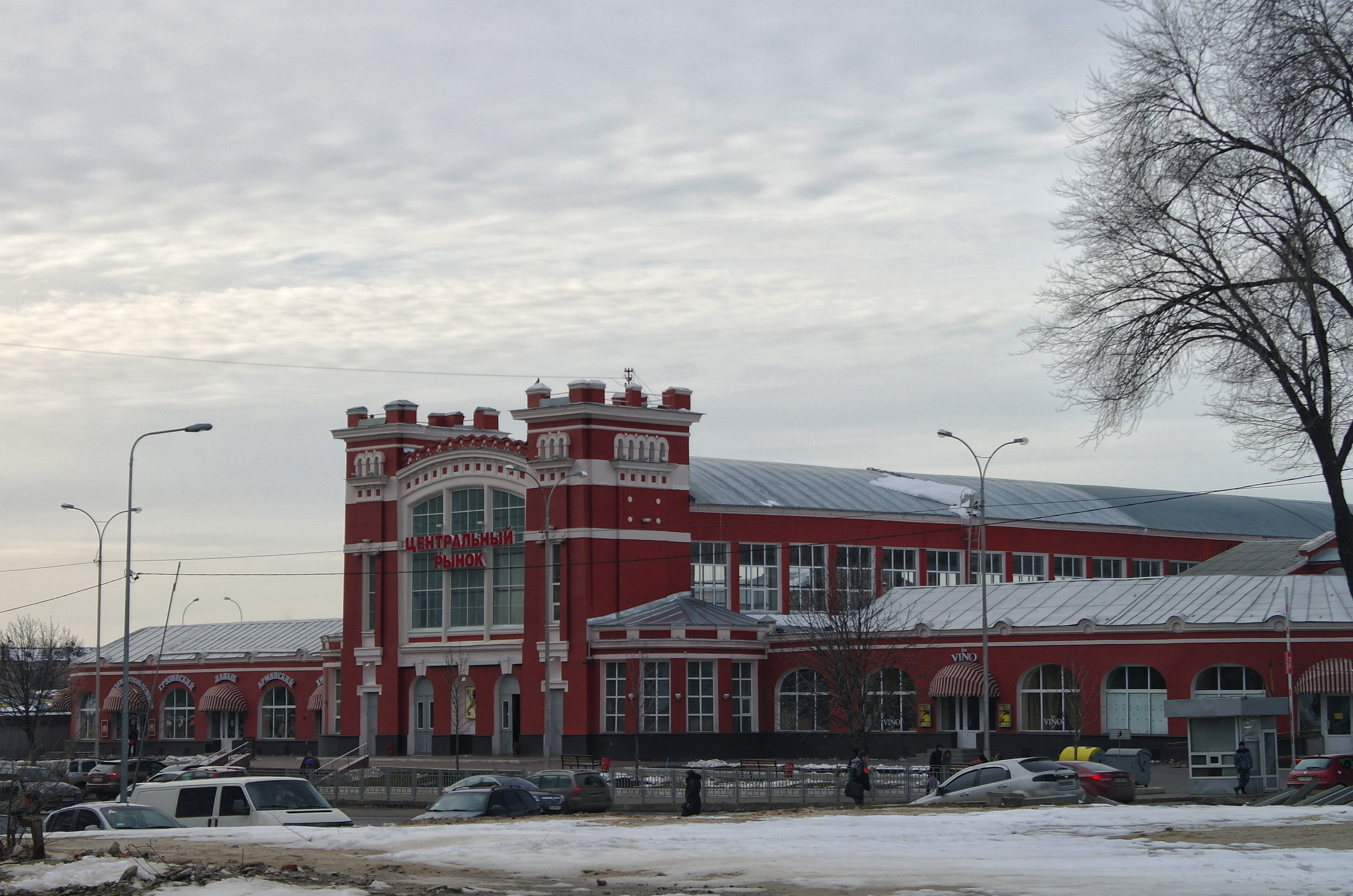 Харків, Ринок